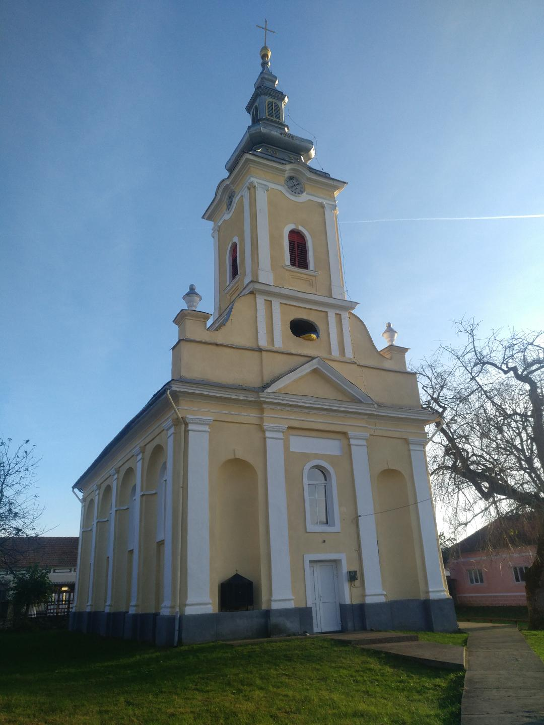 Biserica „Adormirea Maicii Domnului”